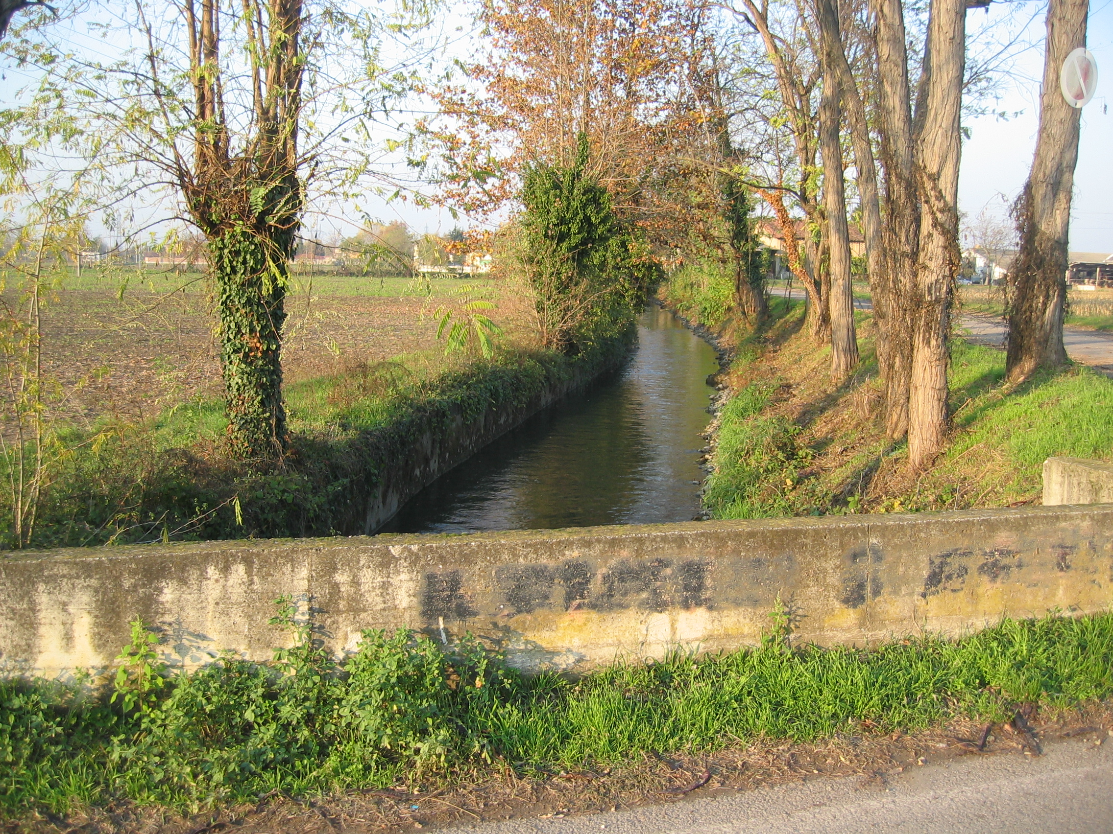 Un fosso nella zona ovest della campagna trevigliese